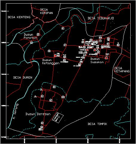 Desa susukan Kecamatan Kabupaten Semarang